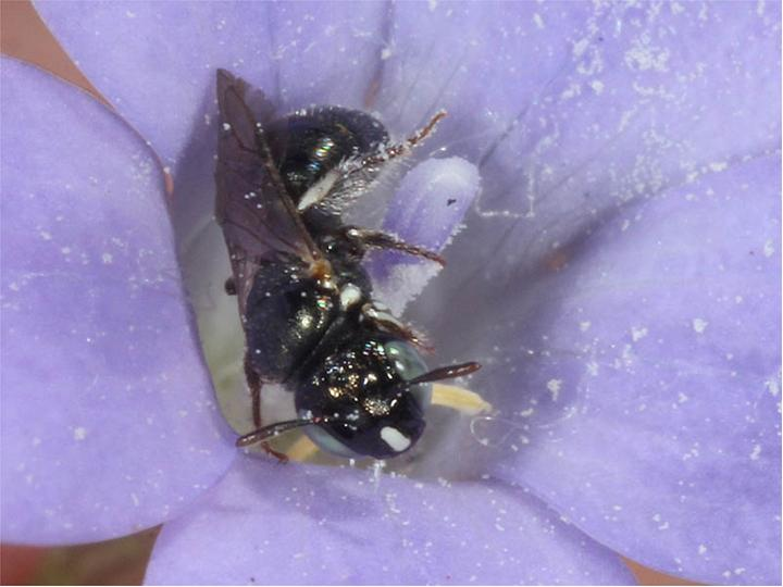 Ceratina australensis female